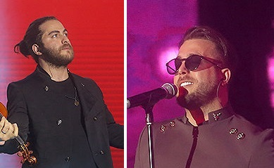 مسیح و آرش در سومین روز جشنواره موسیقی فجر در برج میلاد